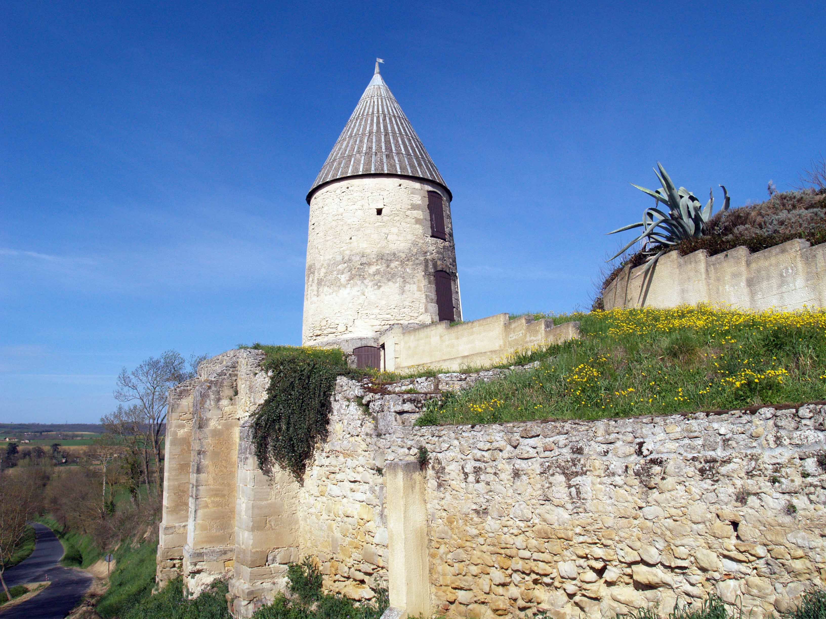 Loubens Lauragais L'ancien moulin à vent Photo personnelle Bertrand Bouret